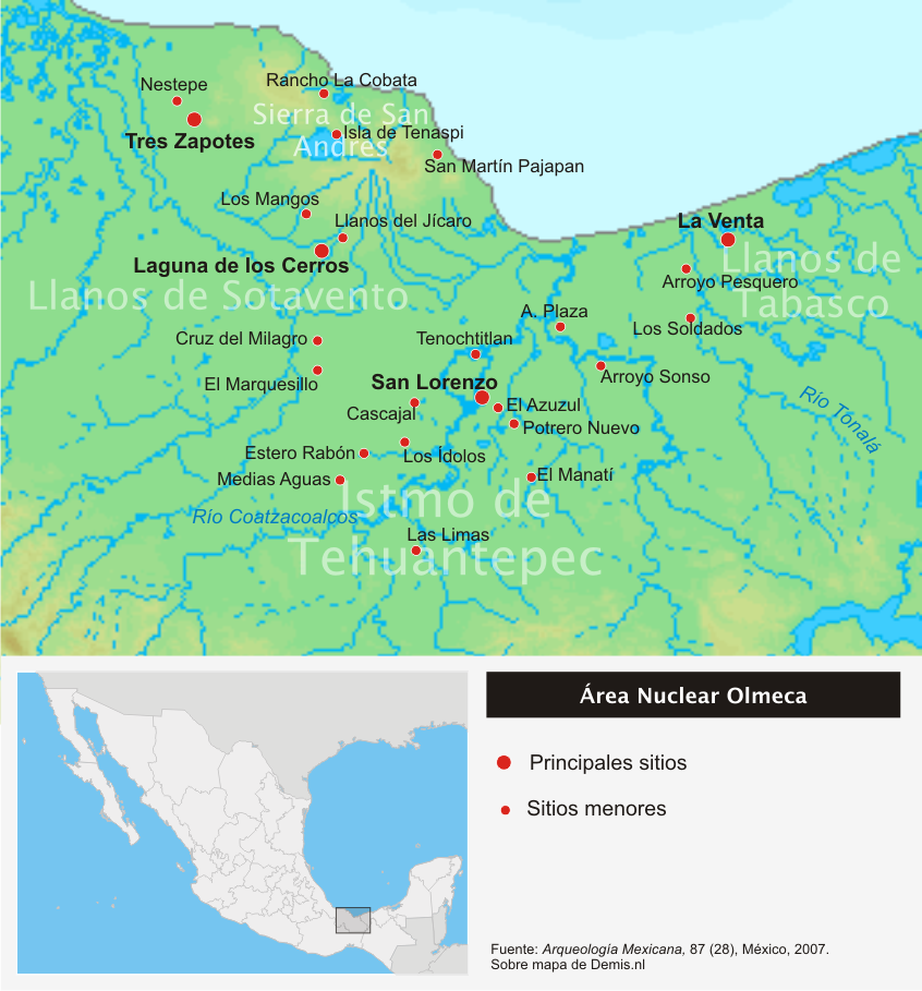 Localización del área nuclear olmeca